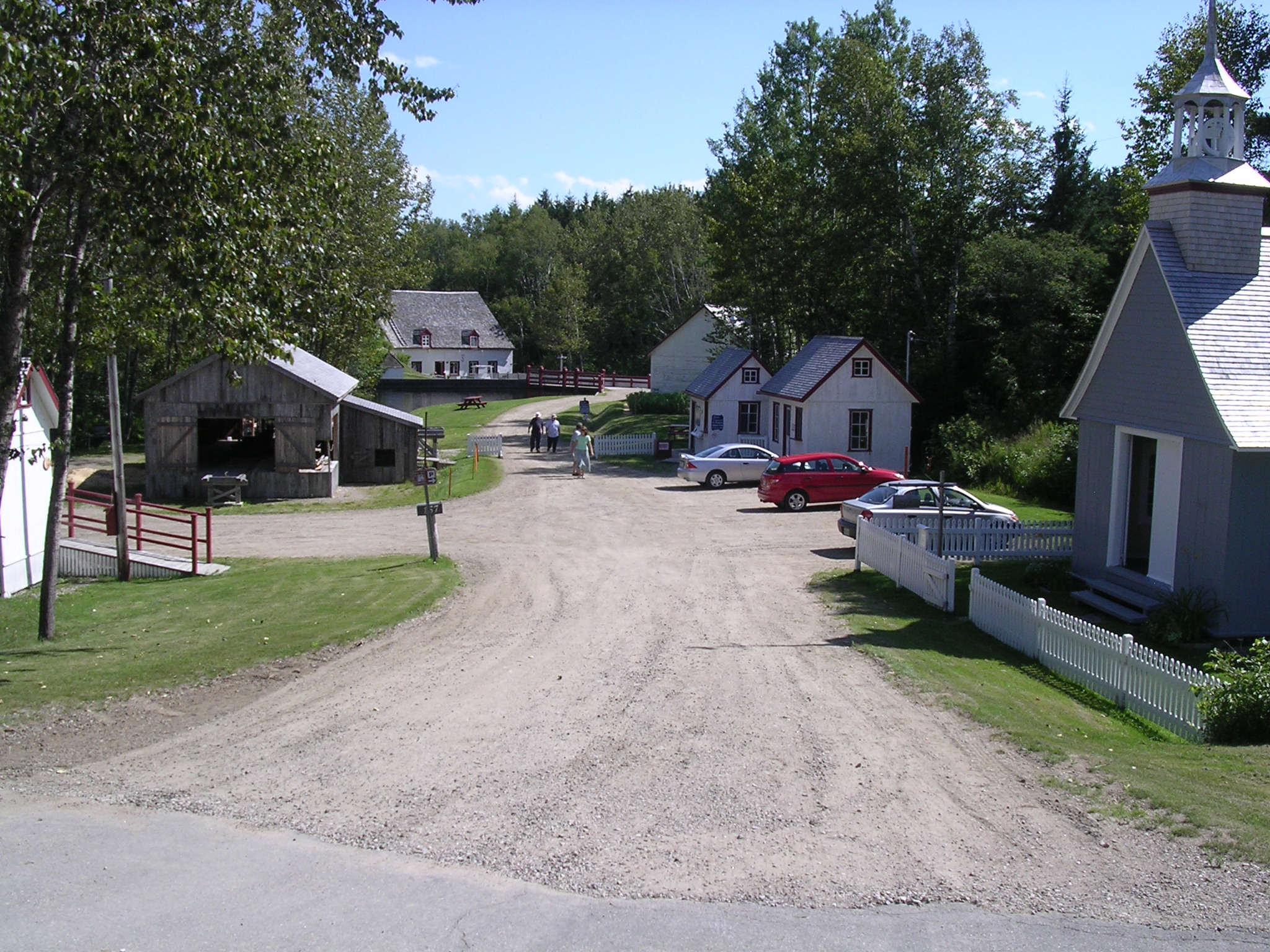 Moulin seigneurial des Éboulements (Charlevoix, Québec), aussi connu sous le nom de Moulin de Sales Laterrière. Sur la photo, à partir de la gauche : le moulin à scie, le moulin à farine, l'écurie, le kiosque d'accueil, la boulangerie, la chapelle Saint-Nicolas.